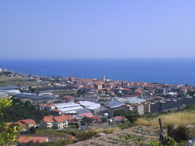 Panorama di Riva Ligure